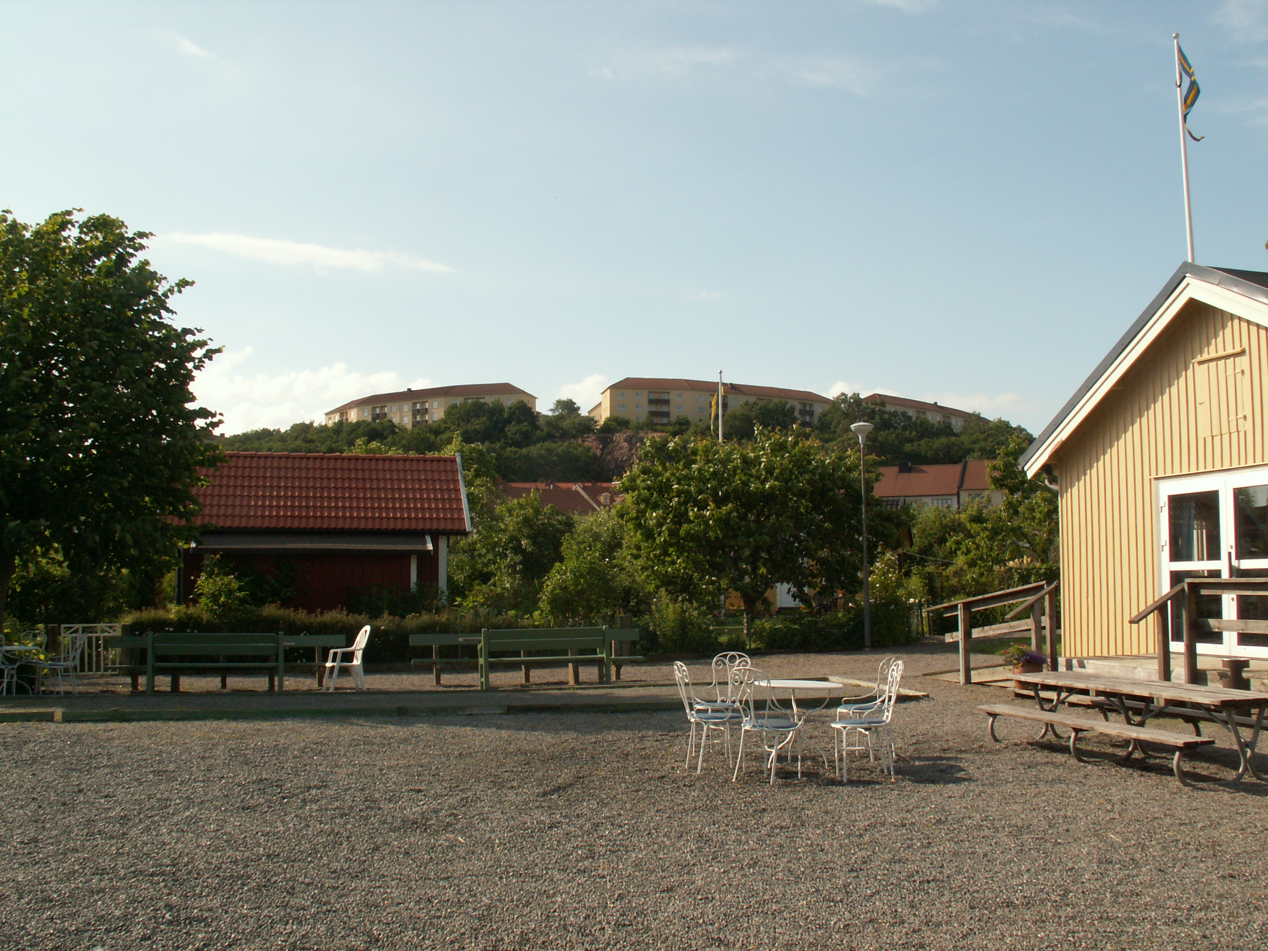 Den centrala, öppna platsen i Slottsskogskolonin i västra Göteborg. Husen på den sydligaste änden av Gråberget sticker upp över den andra bebyggelsen.